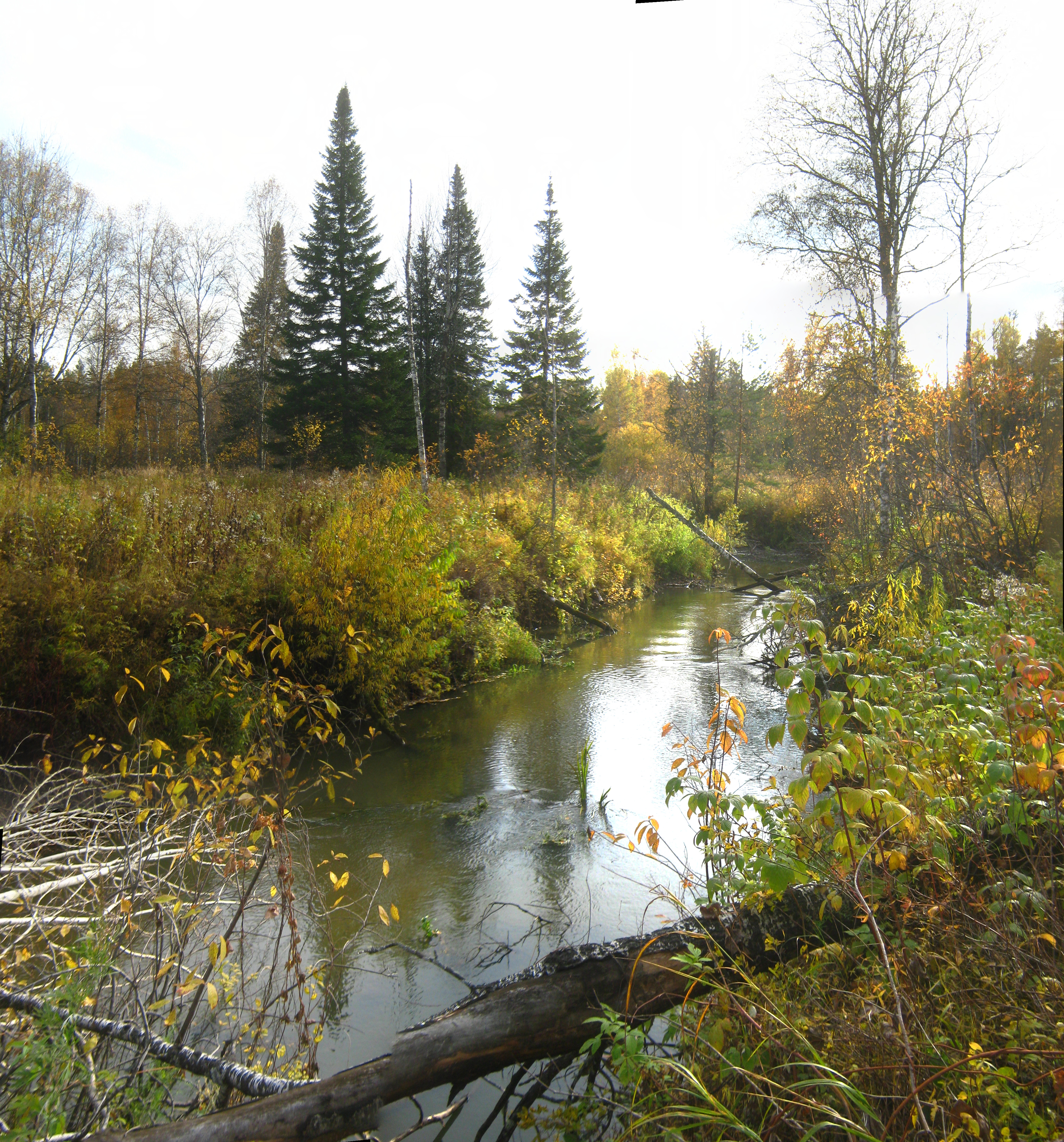 Кисловка недалеко от Кисловки